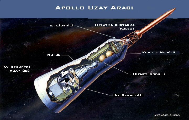 Apollo uzay aracının yapısını gösteren bir diyagram.